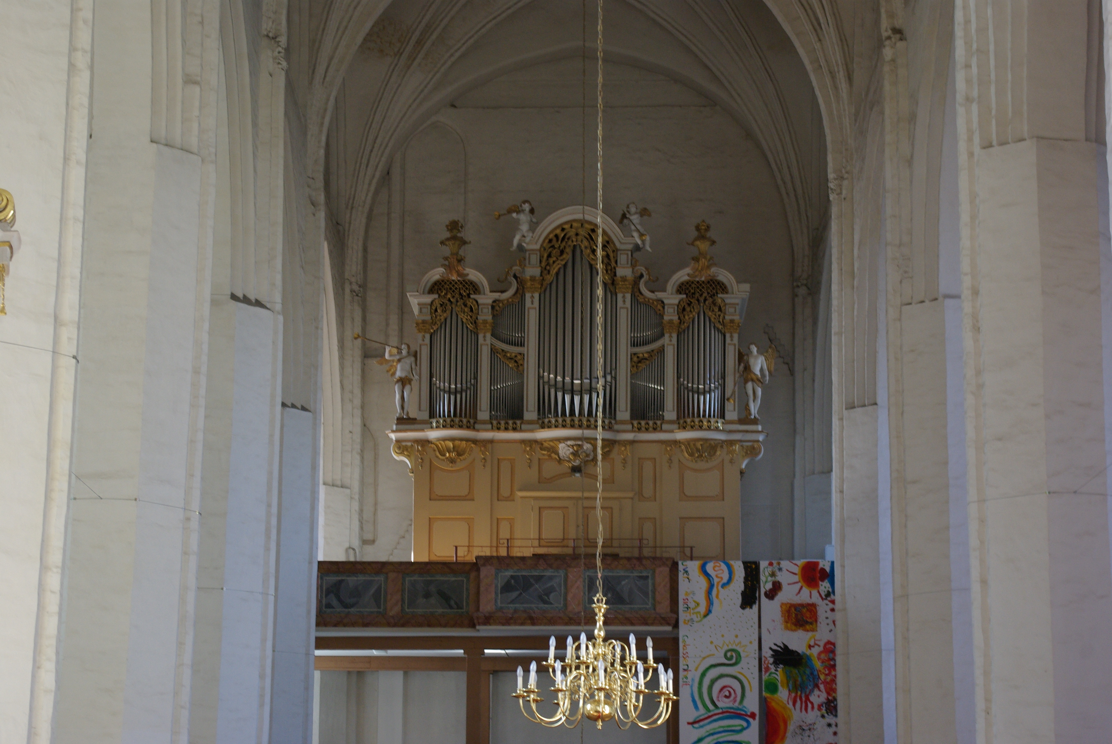 Cottbus in Brandenburg. Die Orgel der Kirche, das Orgelprospekt stammt aus dem Jahre 1759.